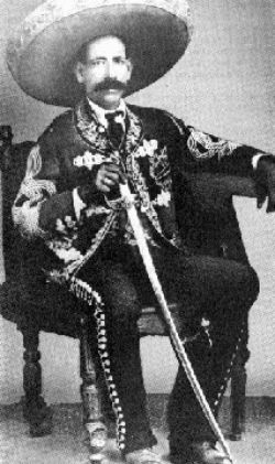 El general Zapatista Juan Salazar Galindo.